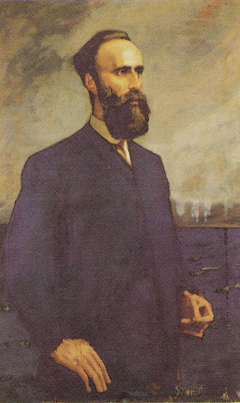 Kirurgian professori Maximus af Schultén (1847–1899), Nylands Nationin tilaama muotokuva.